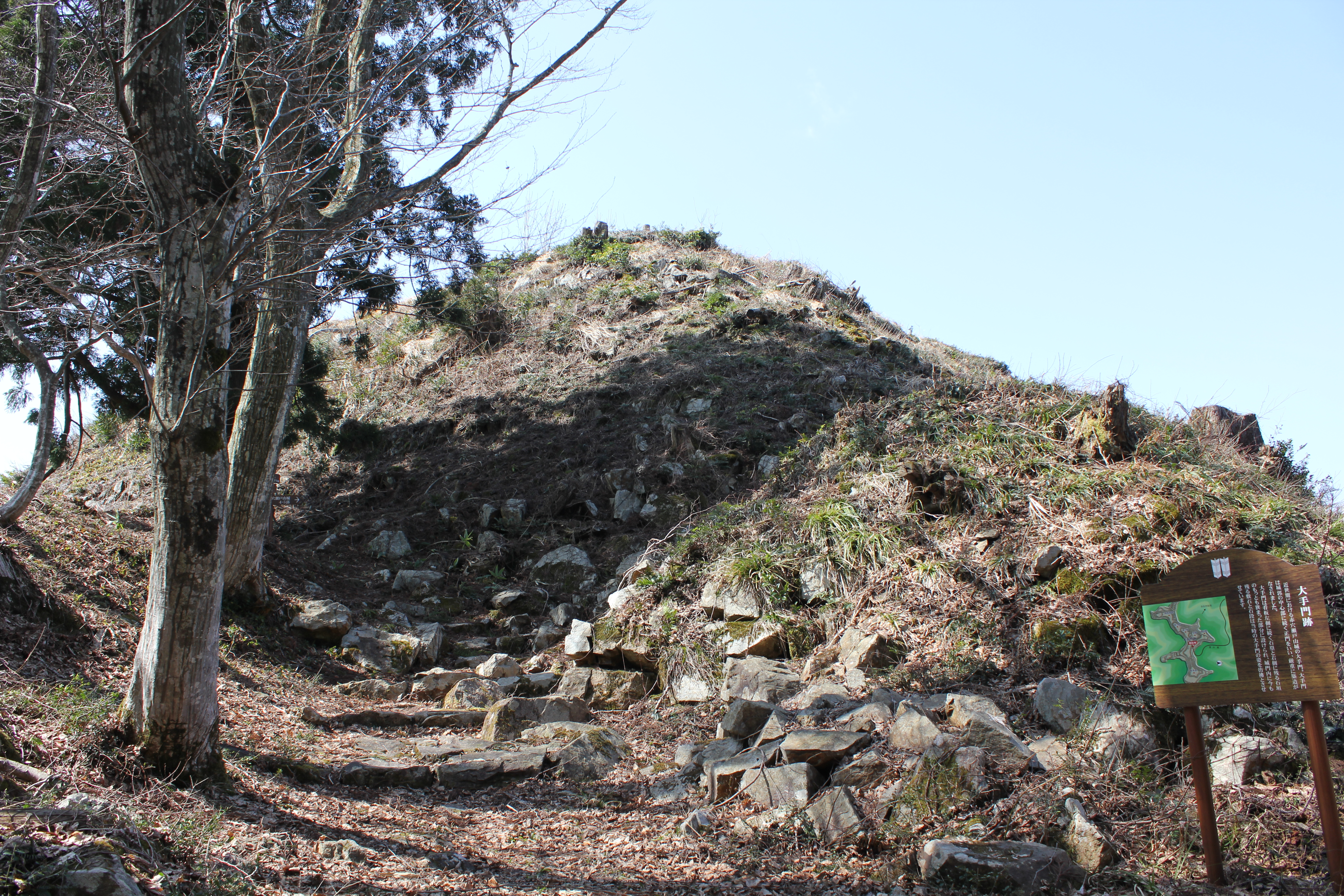 島根県、赤穴瀬戸山城大手門跡